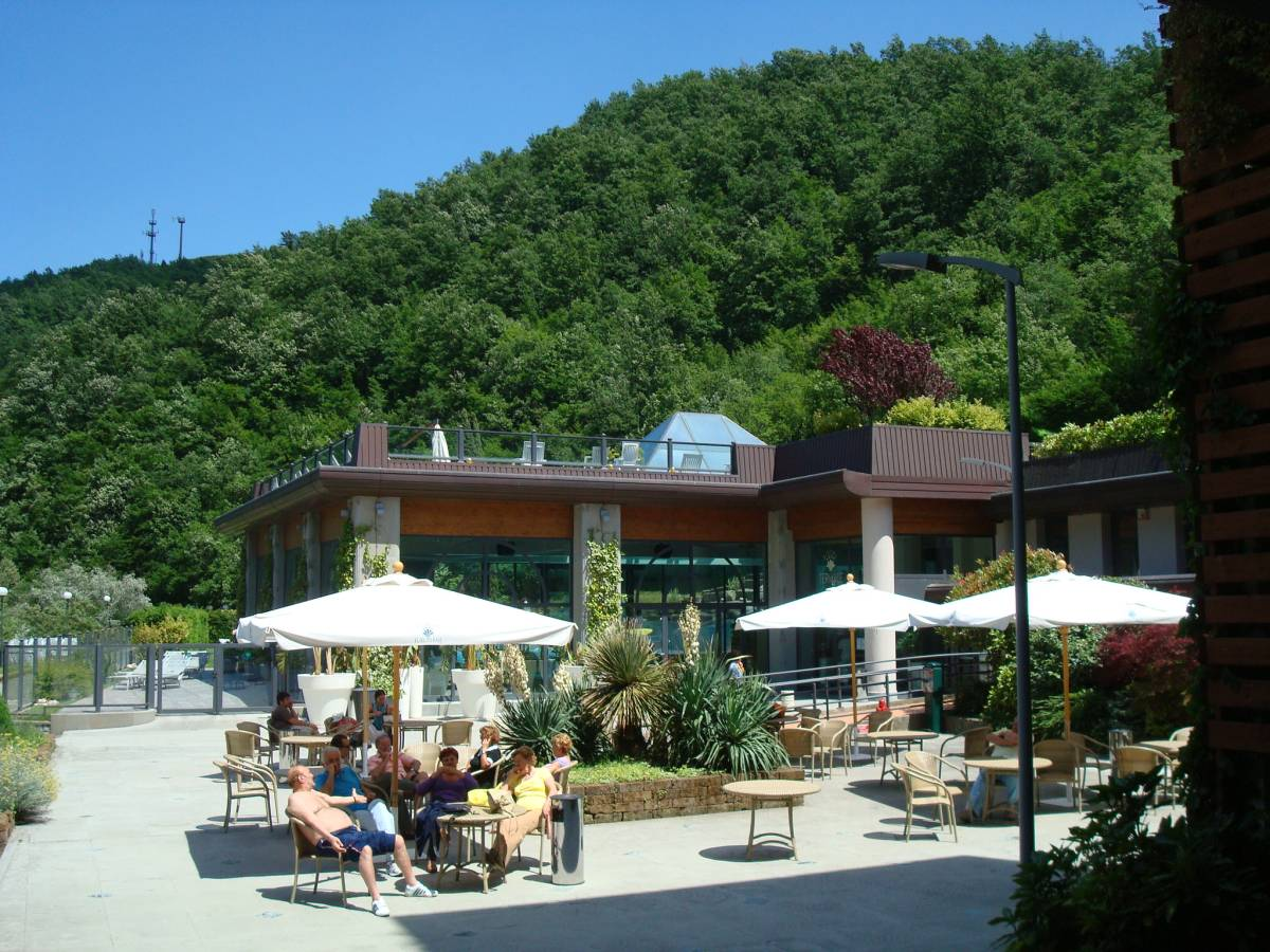 Station thermale de Bagno di Romagna en province d'Emilie-Romagne en Italie du Nord